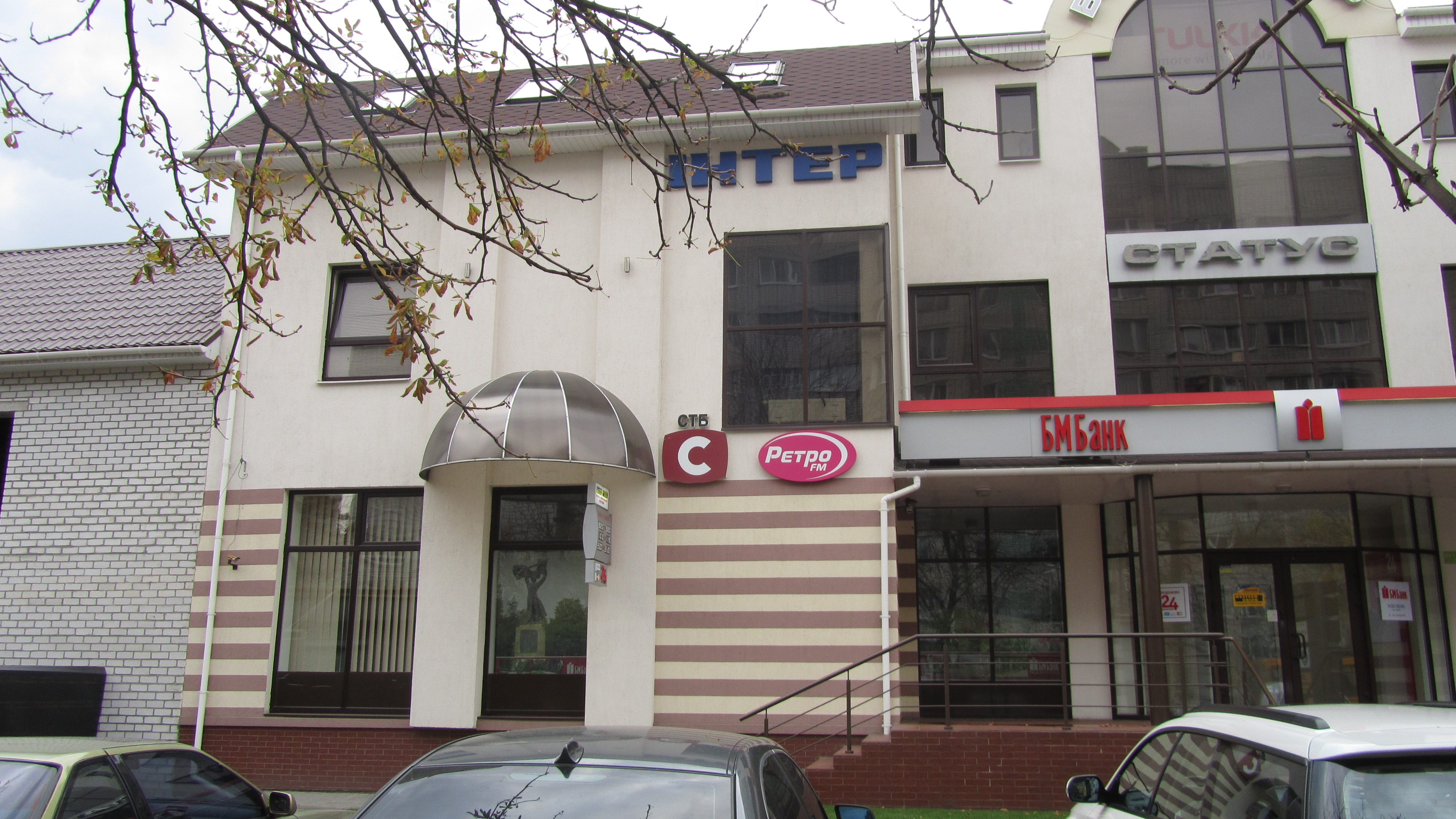 Представництва нацыональних телекомпаній у Кременчуці